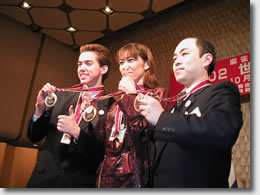 ahjong2002